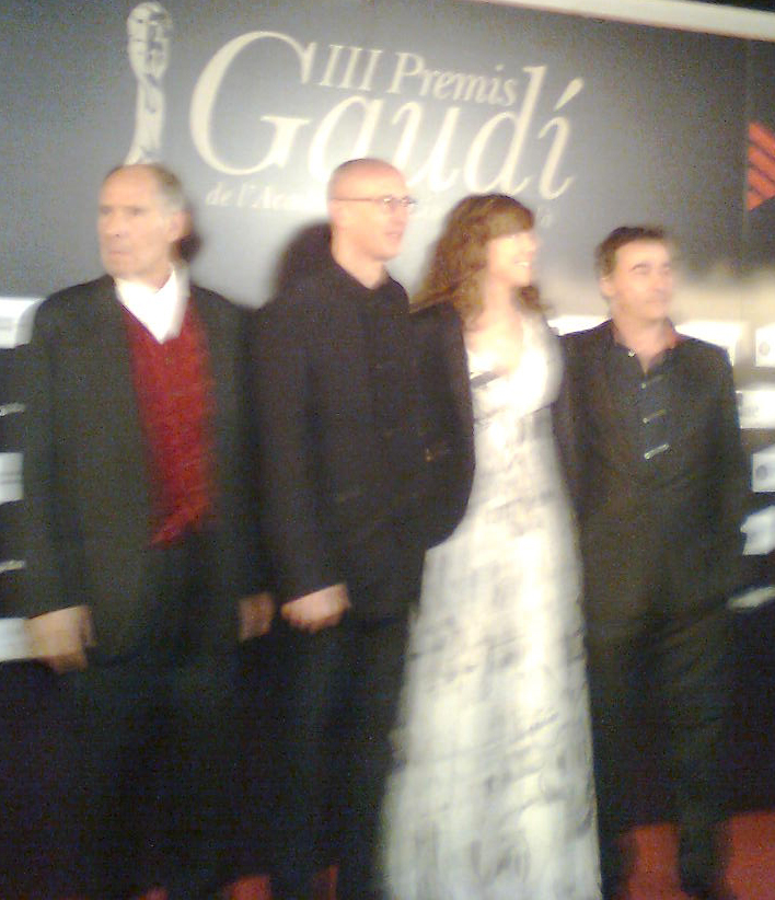 Fermí Reixach, Agustí Vila, Anna Ycobalzeta i Eduard Fernàndez als III Premis Gaudí.